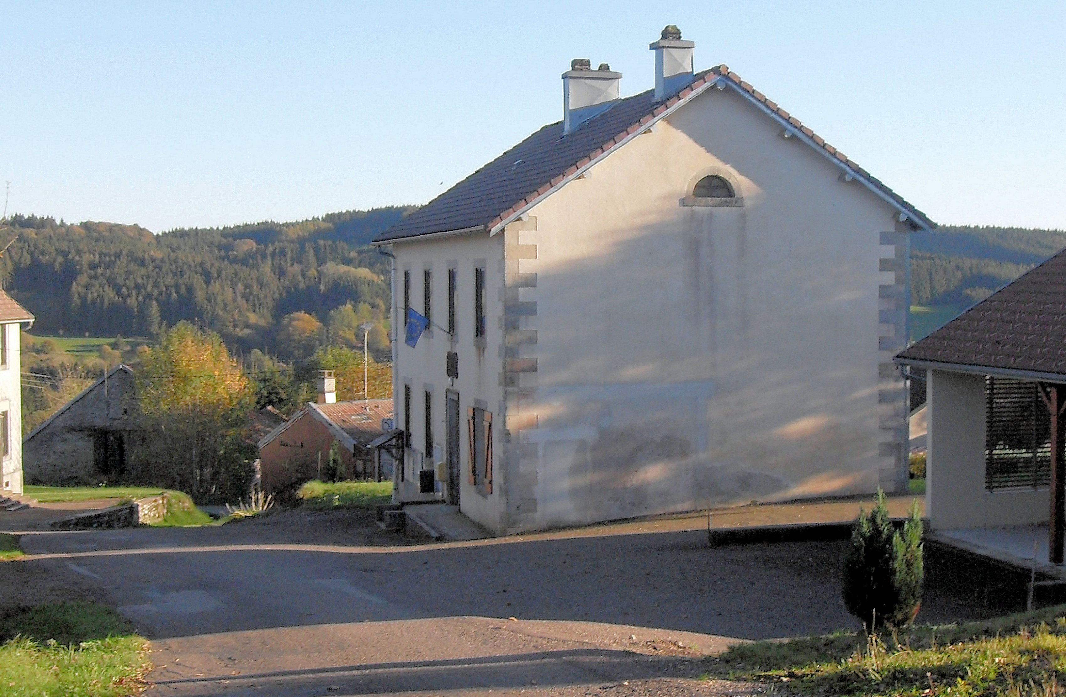 La mairie de Montagne